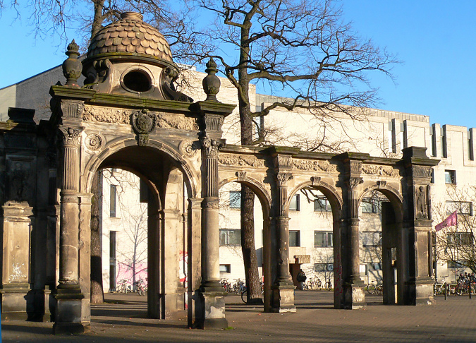 Reste Waldgaststätte Neues Haus in HANNOVER